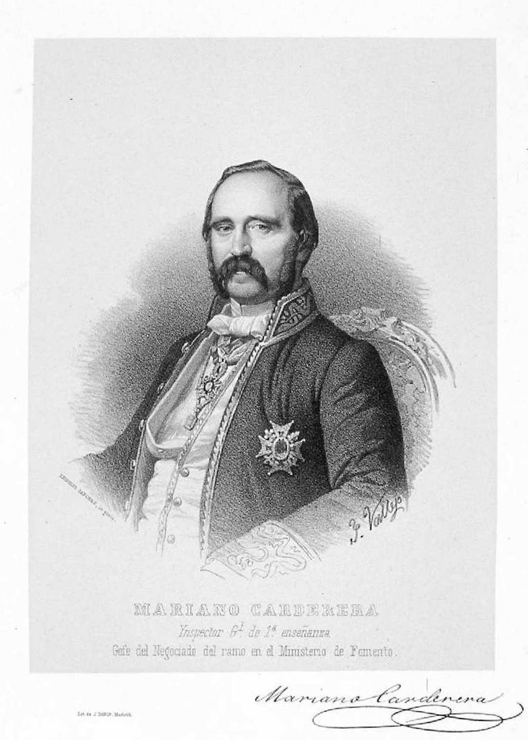 Retrato de Carderera por José Vallejo. Inscripción: Mariano Carderera Ynspector Gl. de 1.ª enseñanza Gefe del Negociado del ramo en el Ministerio de Fomento. Biblioteca Nacional de España